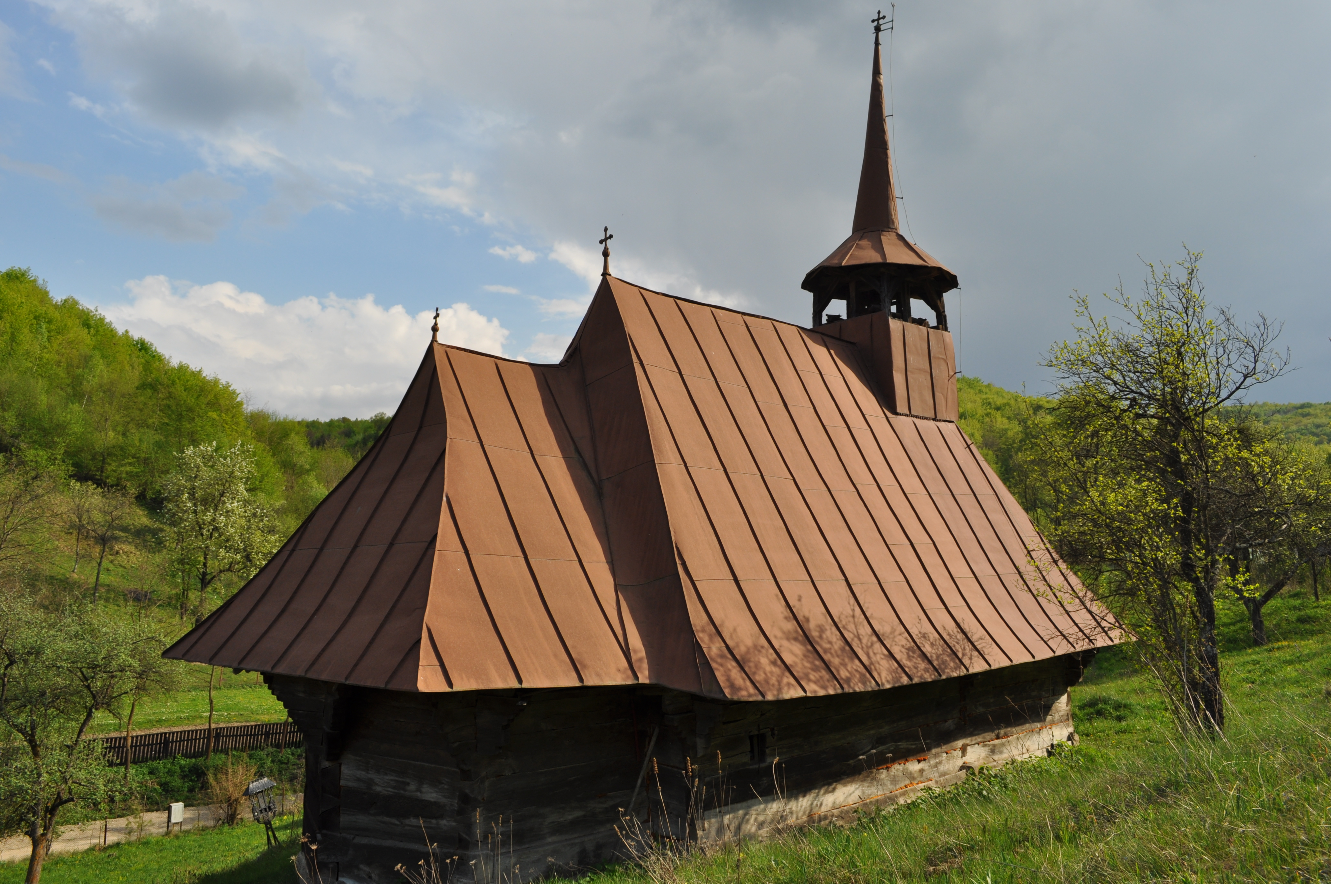 Biserica de lemn din Stolna, județul Cluj